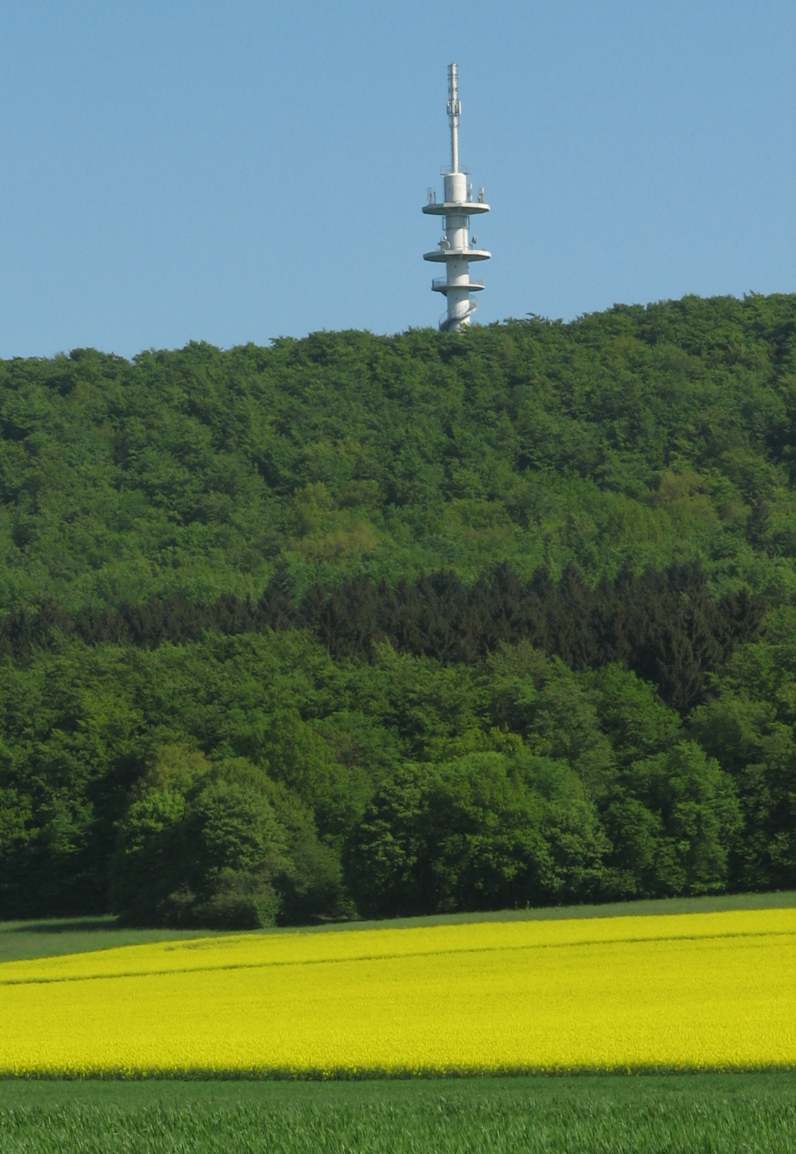 Fernmeldeturm Dissen a.T.W. Dissen, Niedersachsen